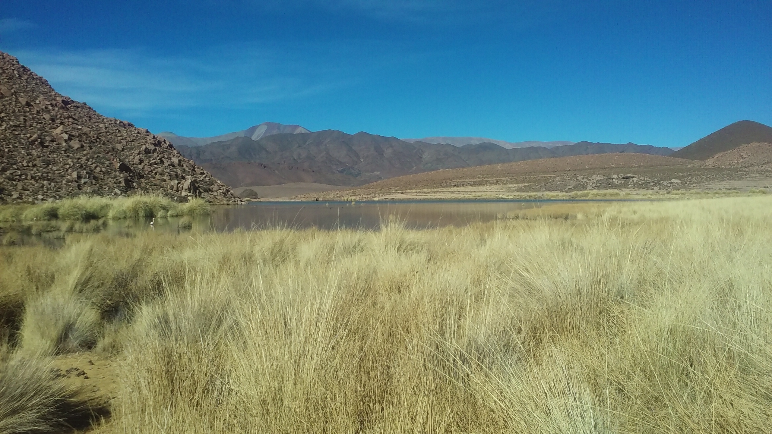 Laguna ubicada en Finca El Toro